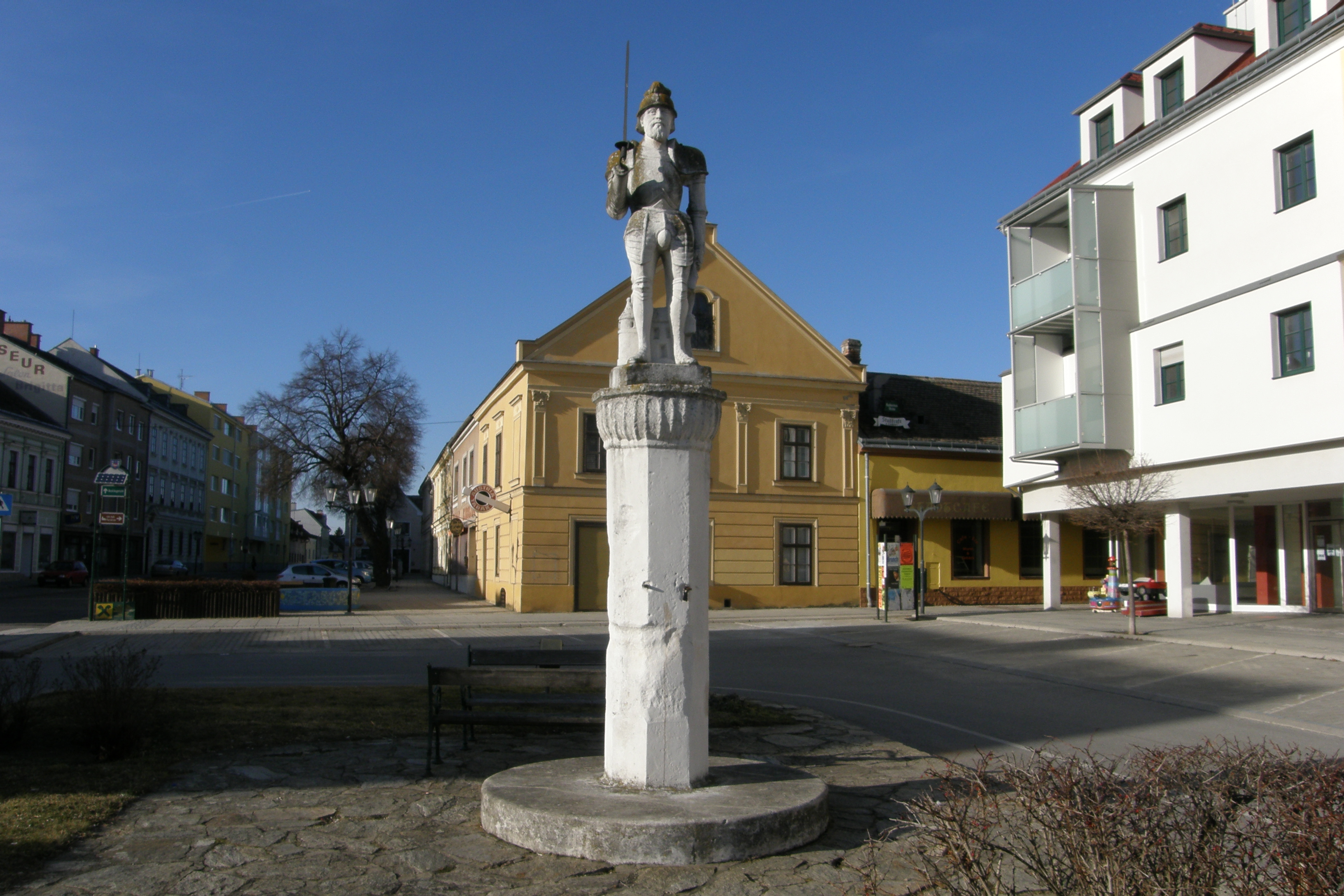 Pranger mit Rolandstatue